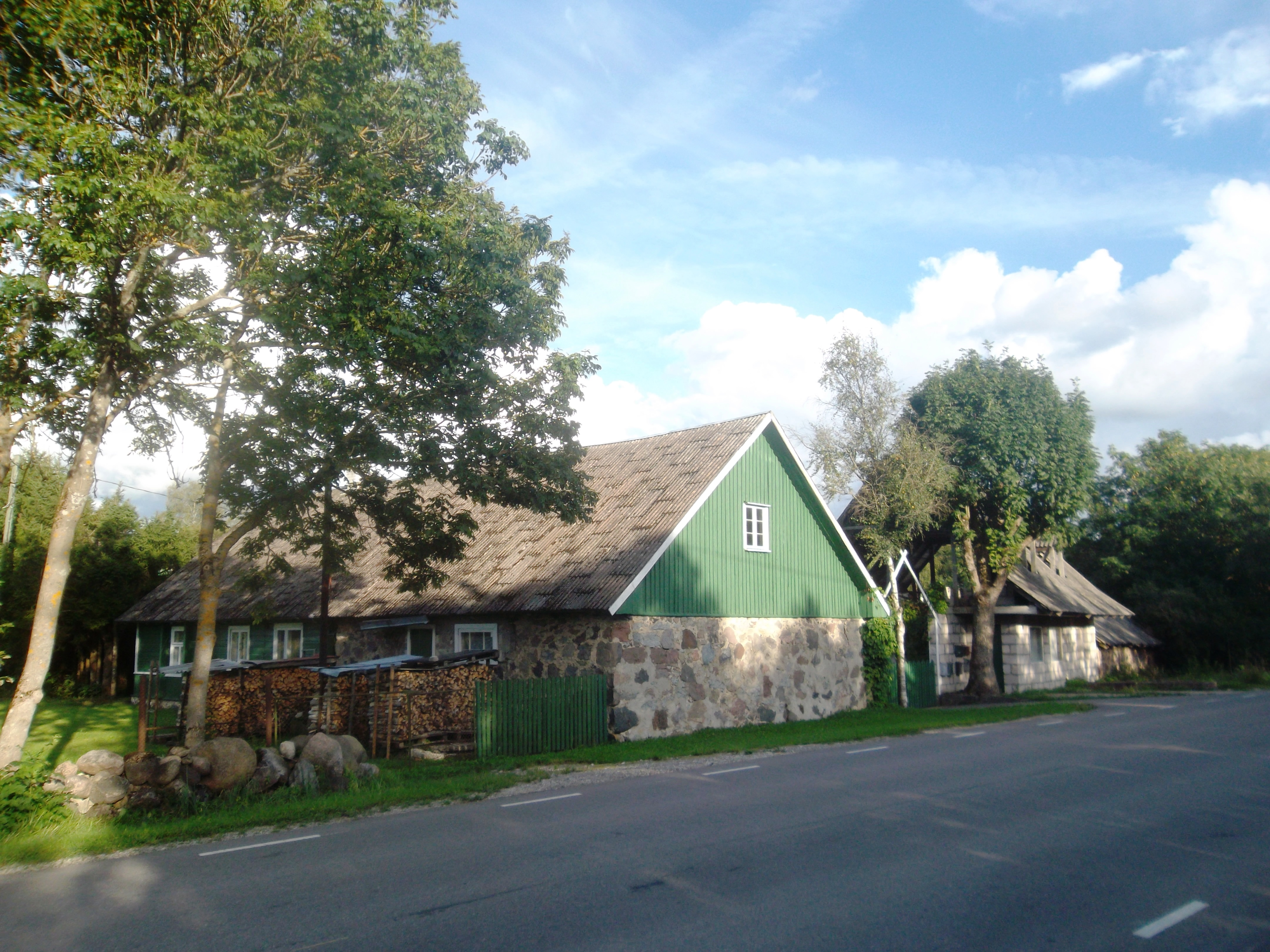 Вана-Аэспа.